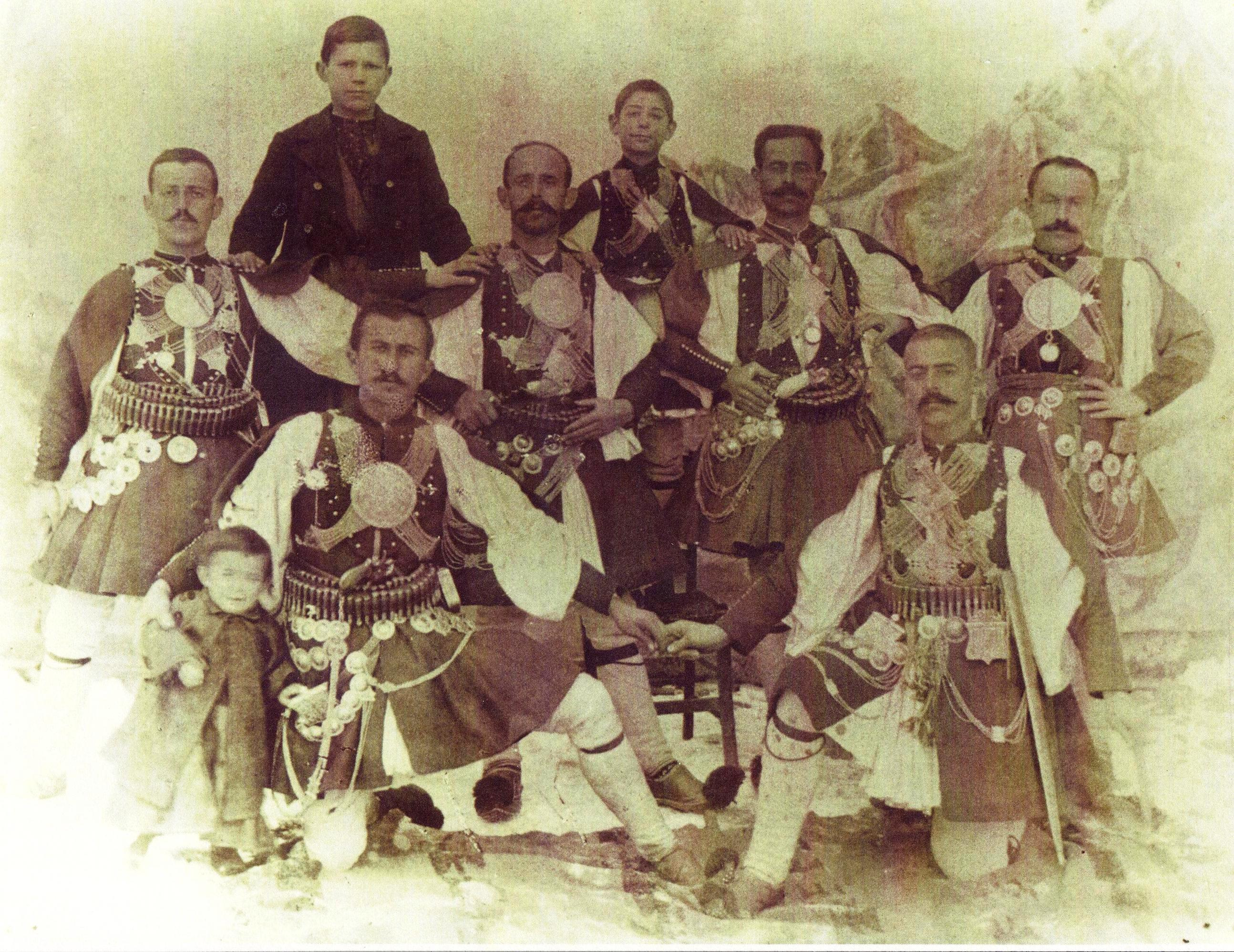 ΄Ενοπλοι κάτοικοι Πισοδερίου το 1900